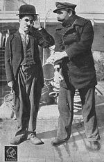 fotografía de la película Shangaied de Charlie Chaplin de 1915